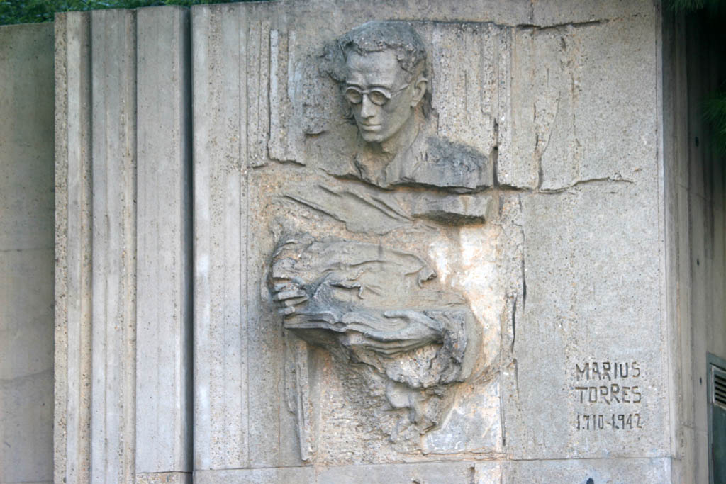 Màrius Torres i Pereña (Lleida, 30 d'agost de 1910 - Puigdolena, Cingles de Bertí, 29 de desembre de 1942) fou un poeta català, en l'òrbita del simbolisme. Va néixer al si d'una família lleidatana benestant, fill d'Humbert Torres i Barberà, polític, diputat al Parlament de Catalunya. Va ser el germà del també polític Víctor Torres. Metge de professió, especialitzat en malalties de l'aparell digestiu, es va interessar des de ben jove per la literatura. Va estudiar al Liceu Escolar i a l'Institut General i Tècnic de Lleida on va arribar a batxillerat. Actualment el centre que es coneixia com Institut General i Tècnic de Lleida porta el nom de Institut Màrius Torres. Als 25 anys, emmalaltí de tuberculosi i va passar la resta de la seua curta vida al Sanatori de Puigdolena. Allà es va dedicar a la lectura i l'escriptura, produint la seva breu obra. Morí als 32 anys. També va col·laborar al diari L'ideal de Lleida amb el pseudònim de Gregori Sastre. La seva producció poètica, amb el títol Poesies, es va publicar pòstumament (Cocoayán, Mèxic, 1947) gràcies al seu amic l'escriptor Joan Sales. La seva poesia es mou en l'òrbita del simbolisme, amb influència de Baudelaire, però també en rep d'altres, com ara la de Carles Riba. Els temes que hi dominen són la música, l'art en general, la naturalesa, que permeten una reflexió sobre la vida humana, el sentiment i la mort. A Google Maps .